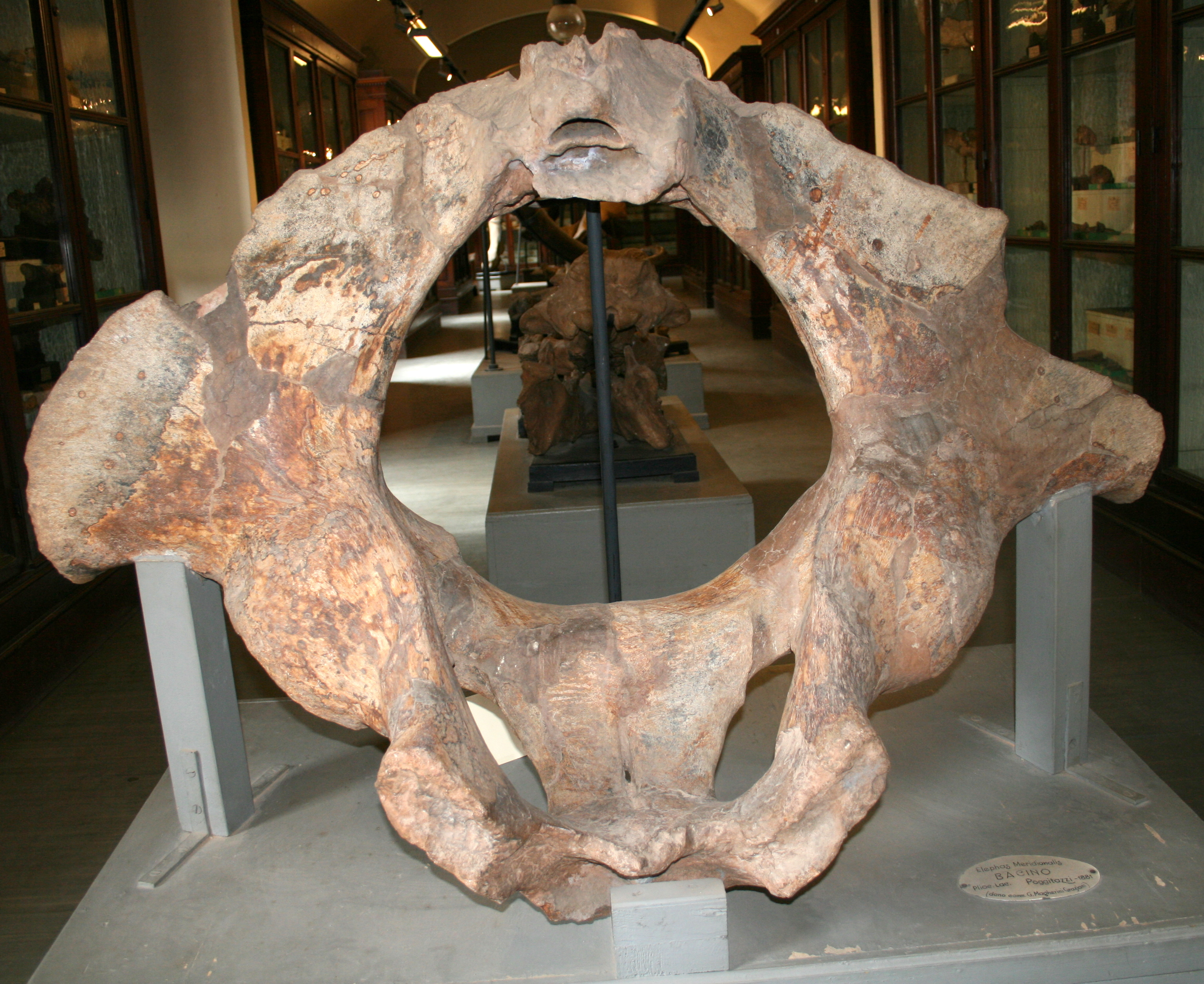 Museo Paleontologico di Montevarchi - Mammuthus meridionalis